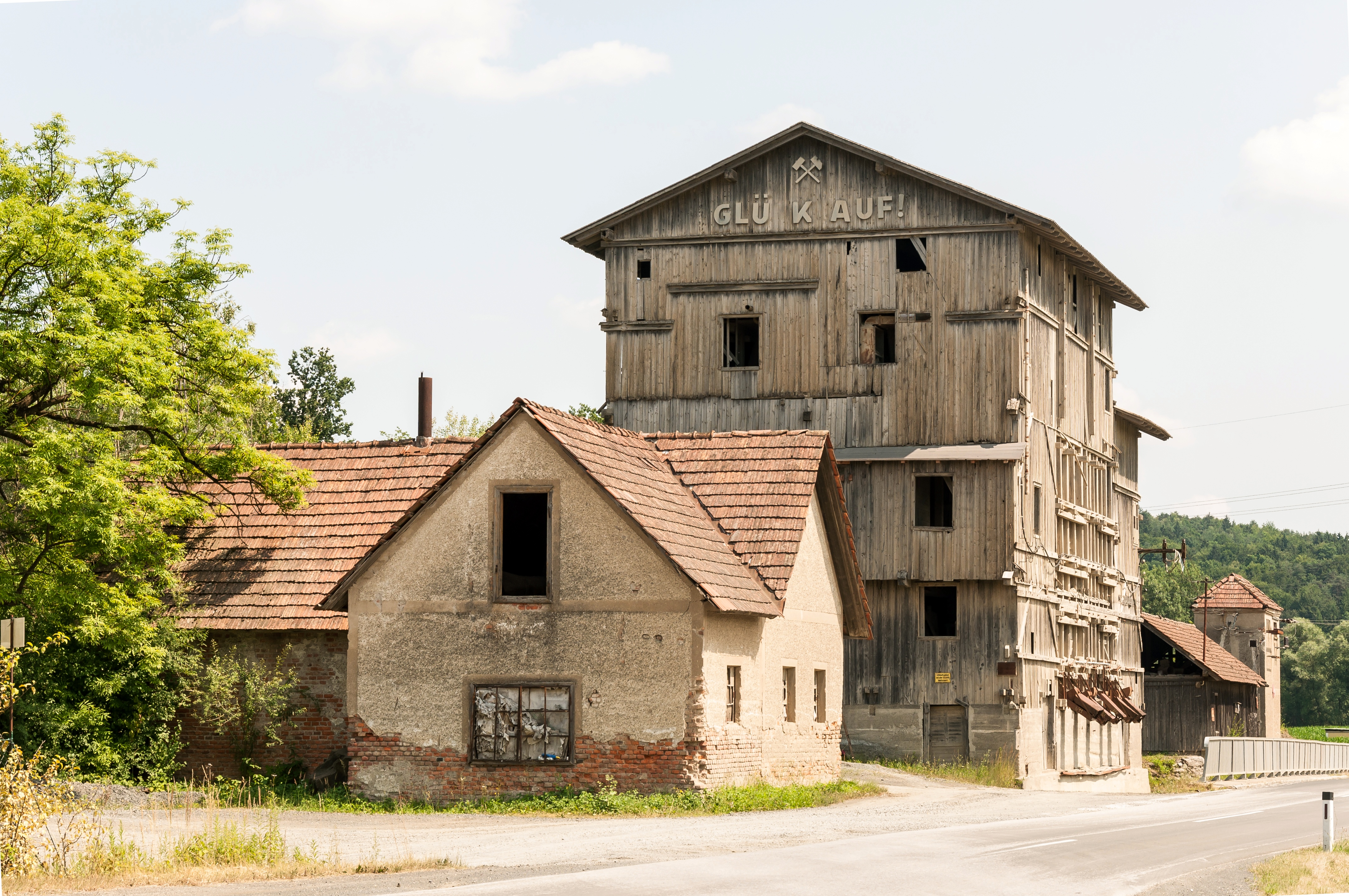 Steinbrechanlage des Basaltsteinbruchs